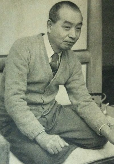 瀧井孝作